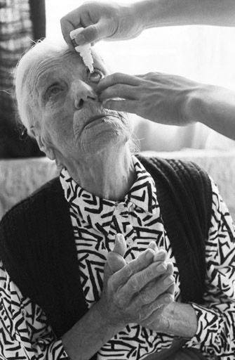 Altenpflege durchgeführt von einem Zivildienstleistenden in München